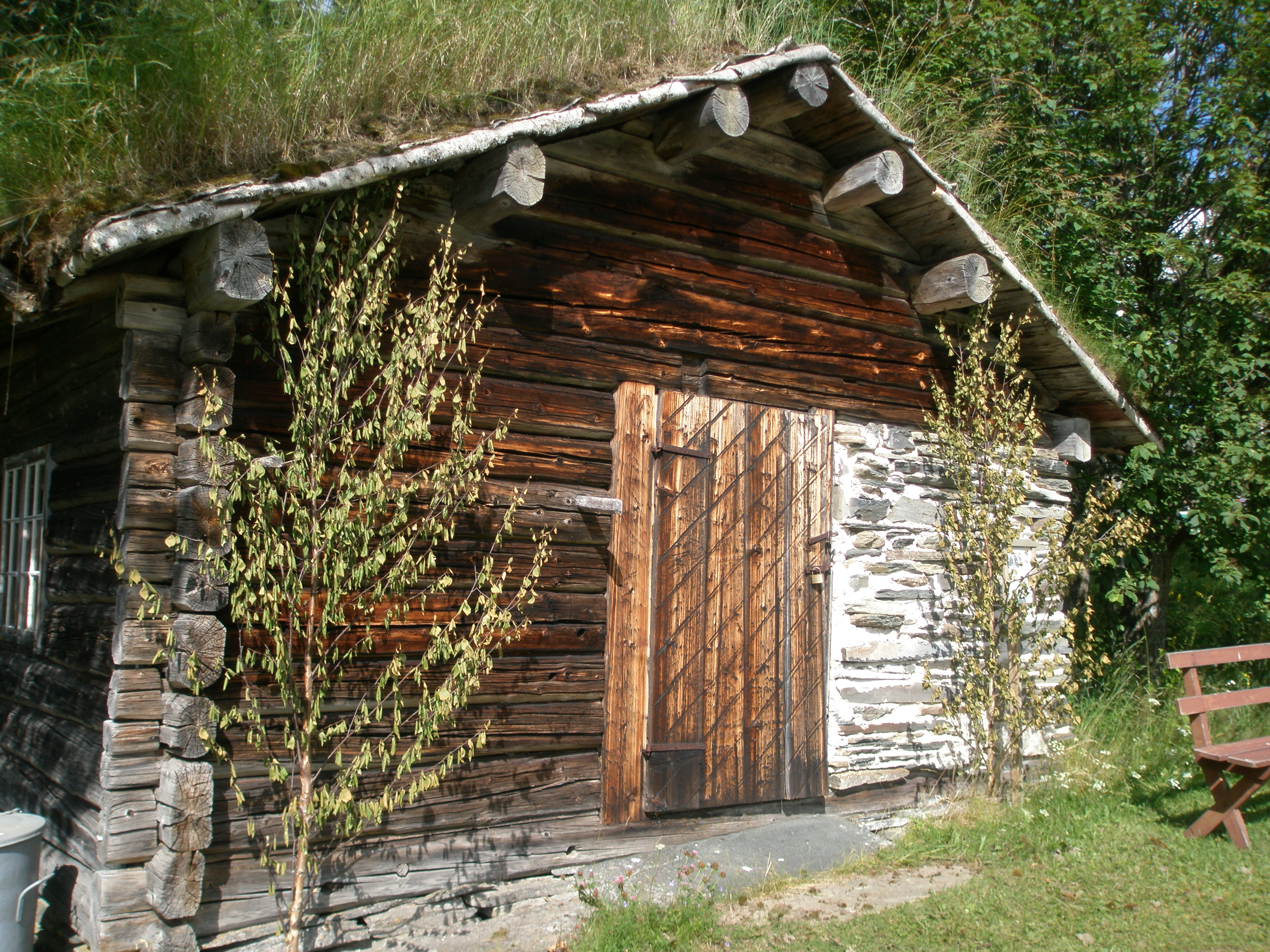 Fäbodstuga från Höbodarna i Åflo på Offerdals hembygdsgård i Ede, Offerdals socken, Krokoms kommun, Jämtland, Sverige.